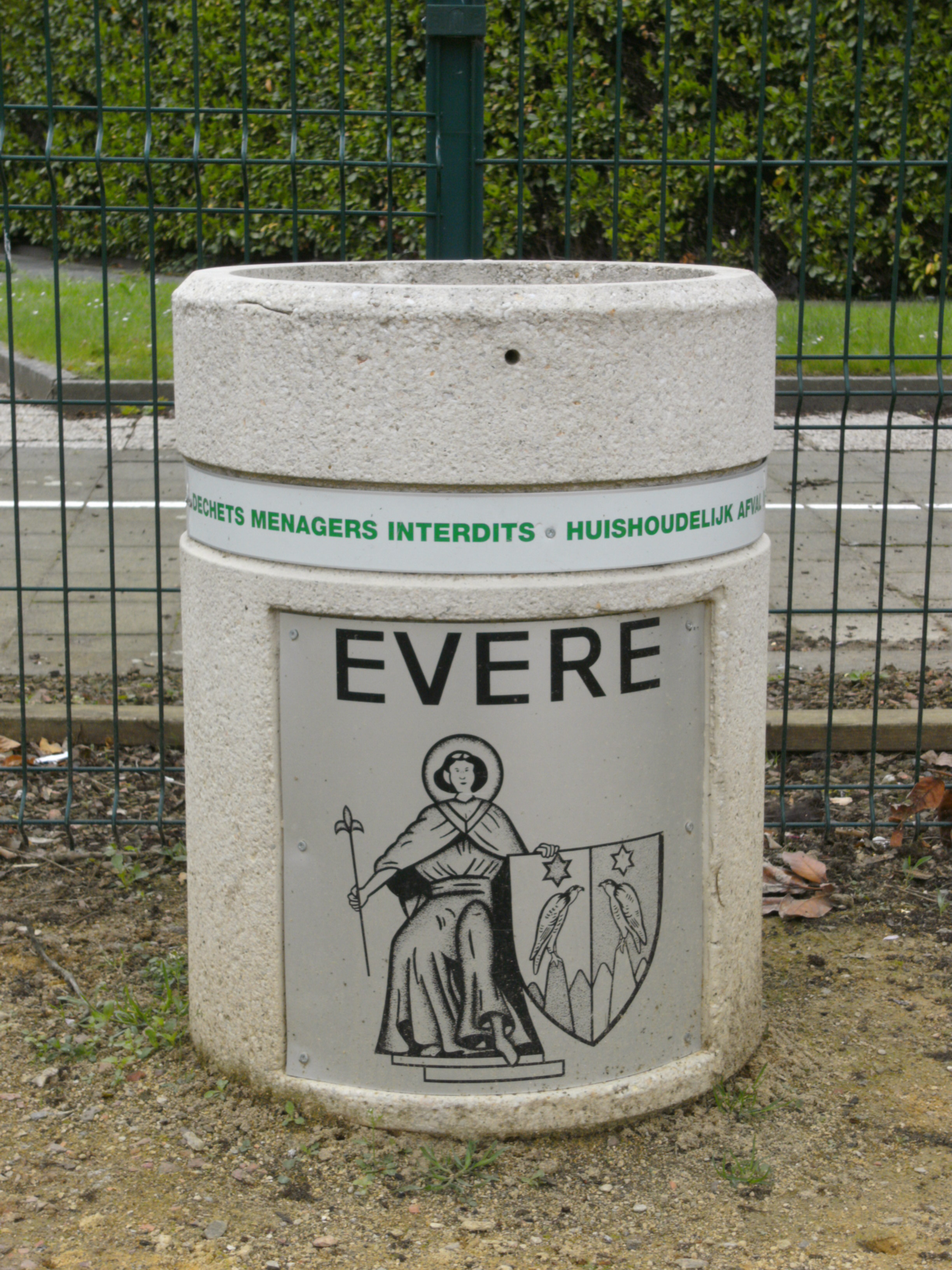 Evere - Poubelles publiques